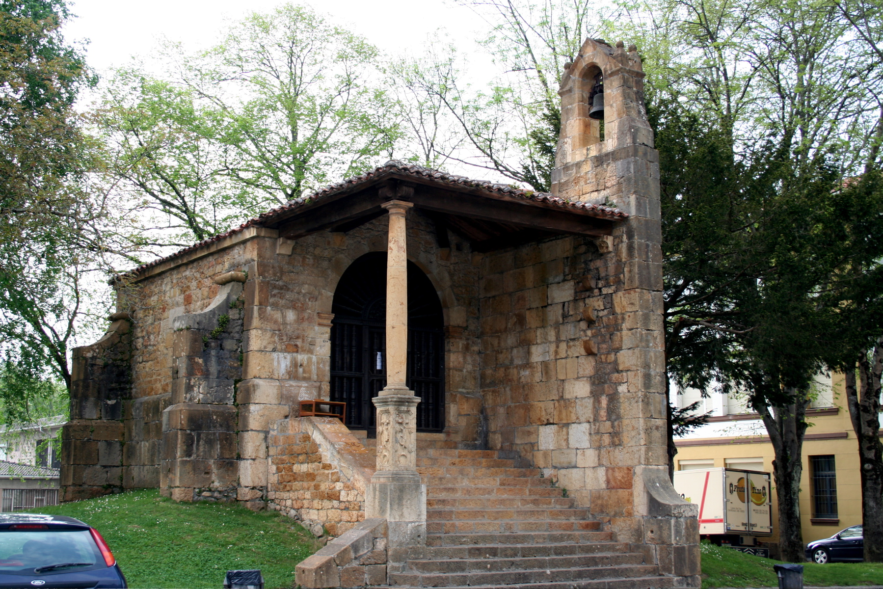 Imagen general de la iglesia de la santa cruz de C. Onís